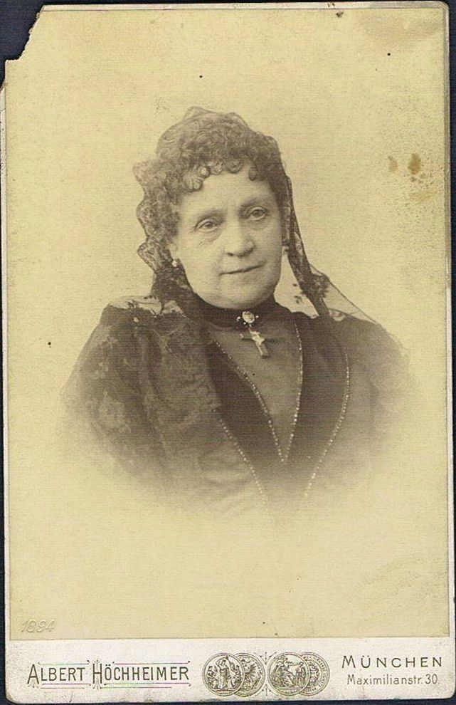 Porträtfoto der Münchner Hofschauspielerin Marie Dahn-Hausmann (1829-1909). Studio Albert Höchheimer, München, Maximilianstr. 30 Auf der Rückseite Autogramm mit Jahresangabe 1895